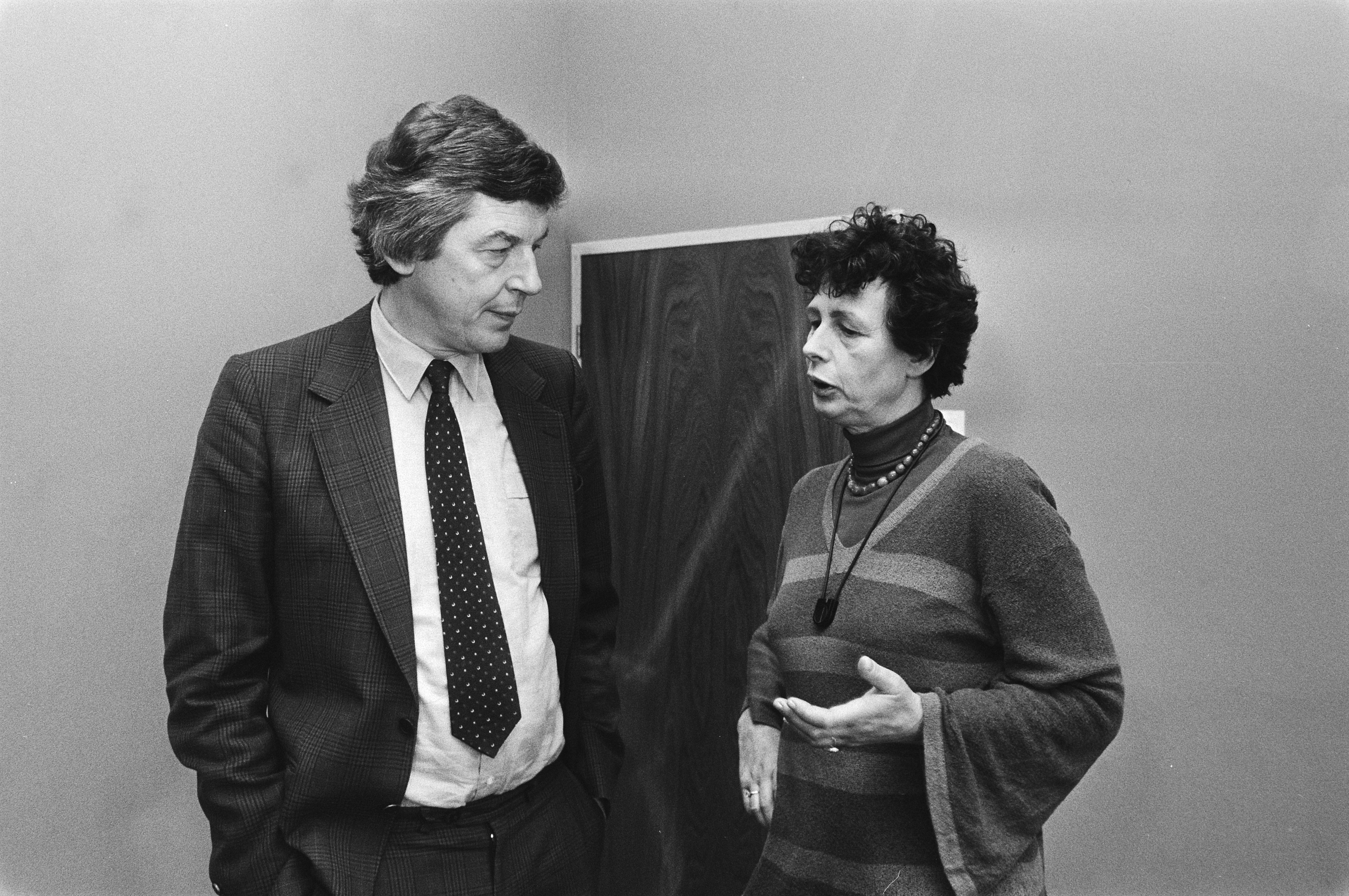 Collectie / Archief : Fotocollectie Anefo Reportage / Serie : Delegatie van de Raad voor het Jeugdbeleid onder leiding van Pijkel Schröder overhandigt het eerste exemplaar van het advies "Geen woorden maar werk" aan VNO-voorzitter Van Veen en FNV-voorzitter Kok Beschrijving : Wim Kok in gesprek met mw. Schröder Datum : 2 februari 1983 Persoonsnaam : Kok, Wim, Schröder, M.G. Fotograaf : Bogaerts, Rob / Anefo Auteursrechthebbende : Nationaal Archief Materiaalsoort : Negatief (zwart/wit) Nummer archiefinventaris : bekijk toegang 2.24.01.05 Bestanddeelnummer : 932-4883